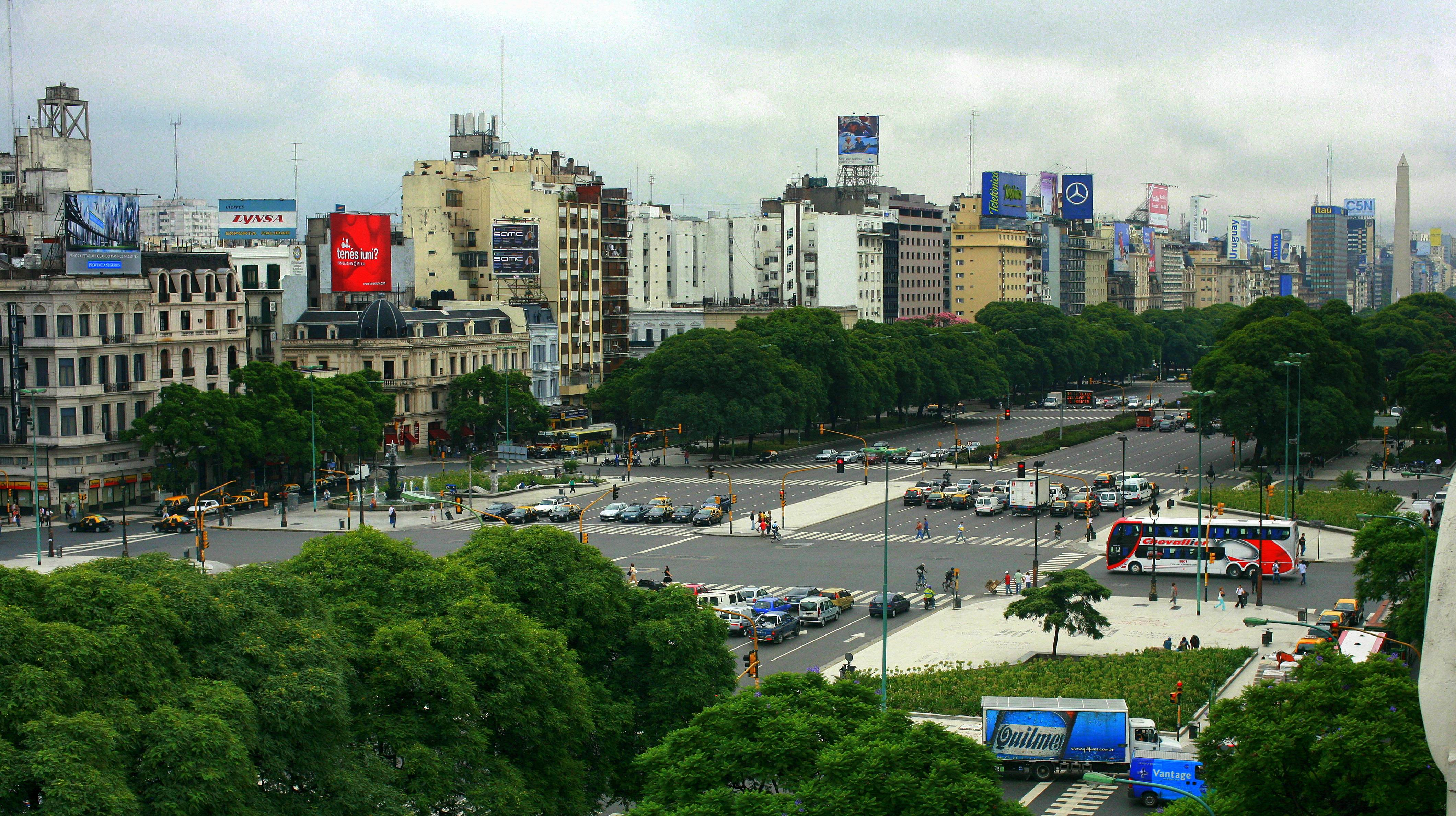 Buenos Aires, Argentina